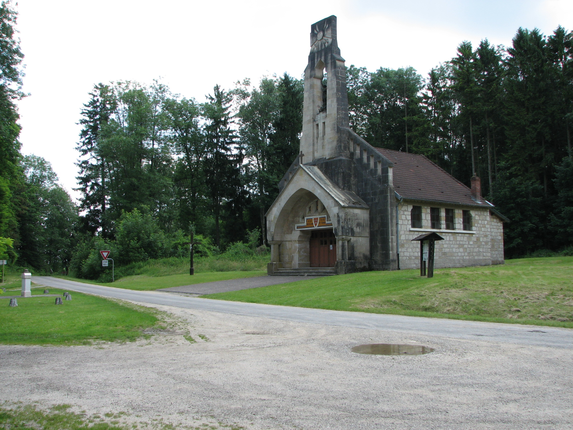 Eglise reconstruite après la guerre à Ornes, Village français détruit durant la Première Guerre mondiale.